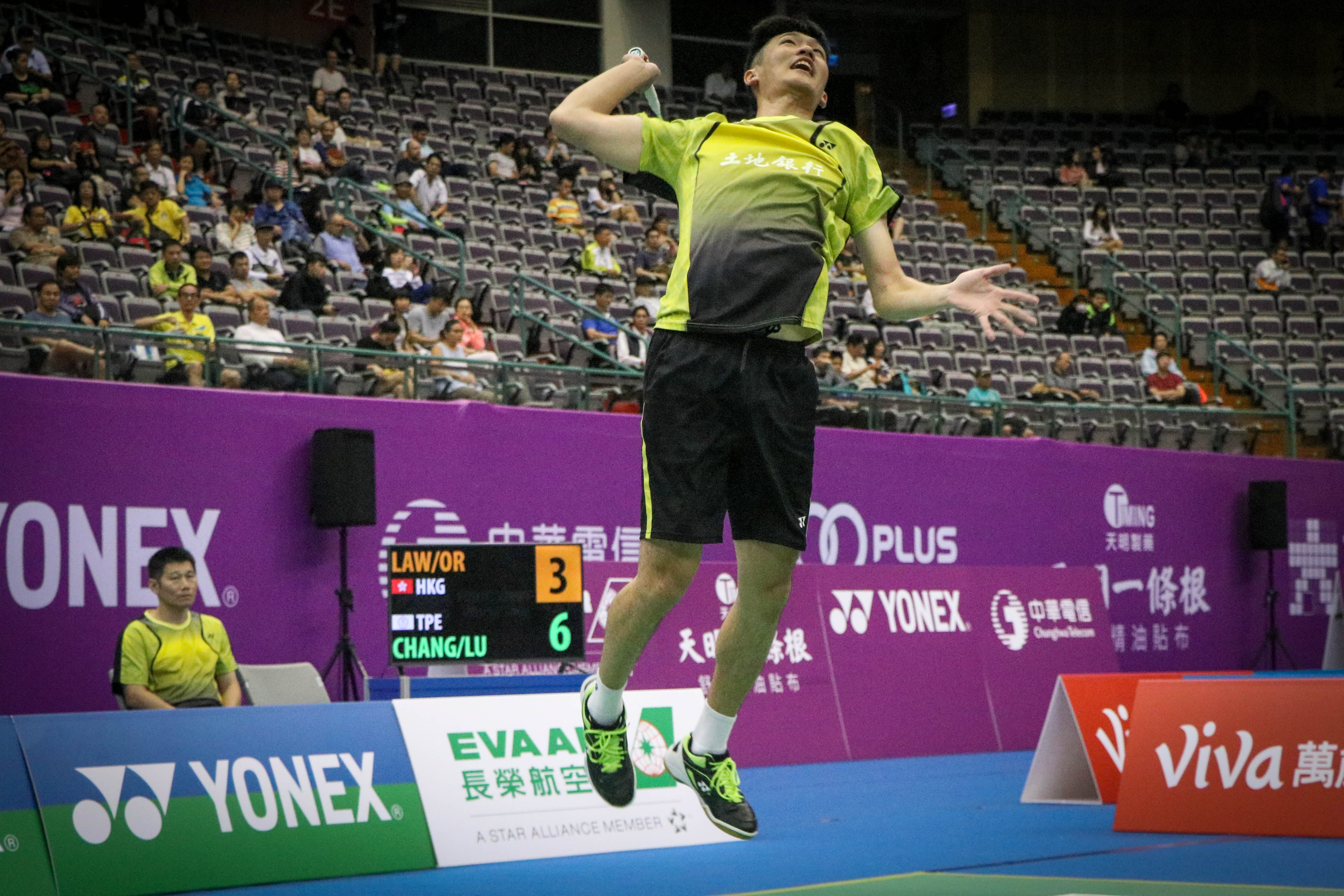 2018 台北OPEN 10/03